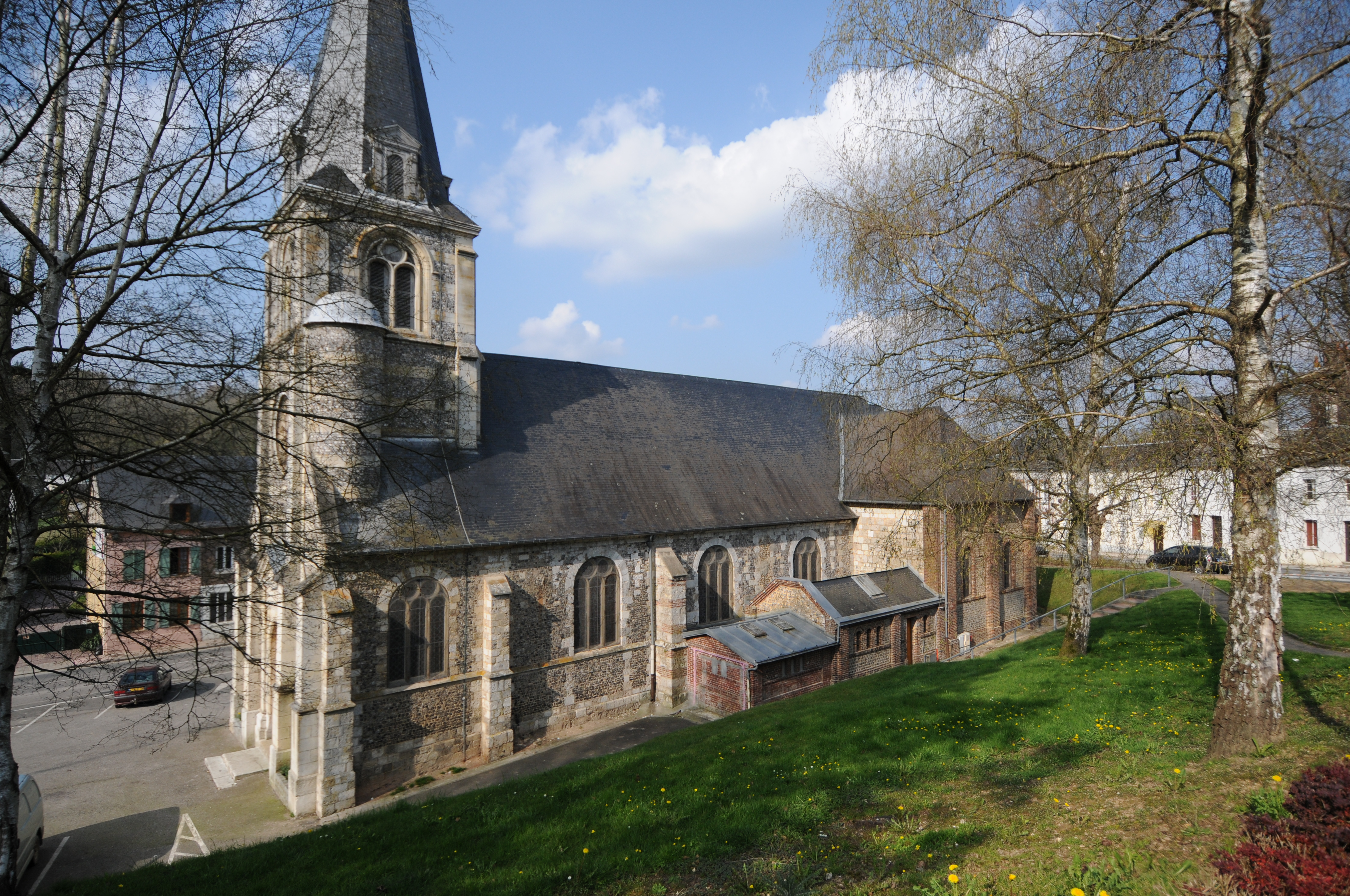 Eglise de Fontaine le Bourg depuis la rue des Abbés de Fécamp